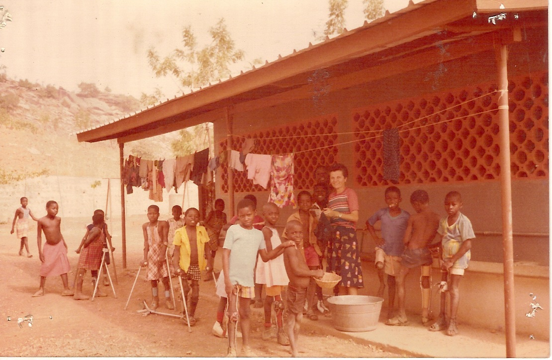 Marguerite Oré a vécu à Bombouaka au Togo de 1975 à 1984. Rentrée en France pour se soigner elle décède en juin 1991. Elle est l'initiatrice du centre de handicapés aujourd'hui appelé Centre Saint Louis Orione.